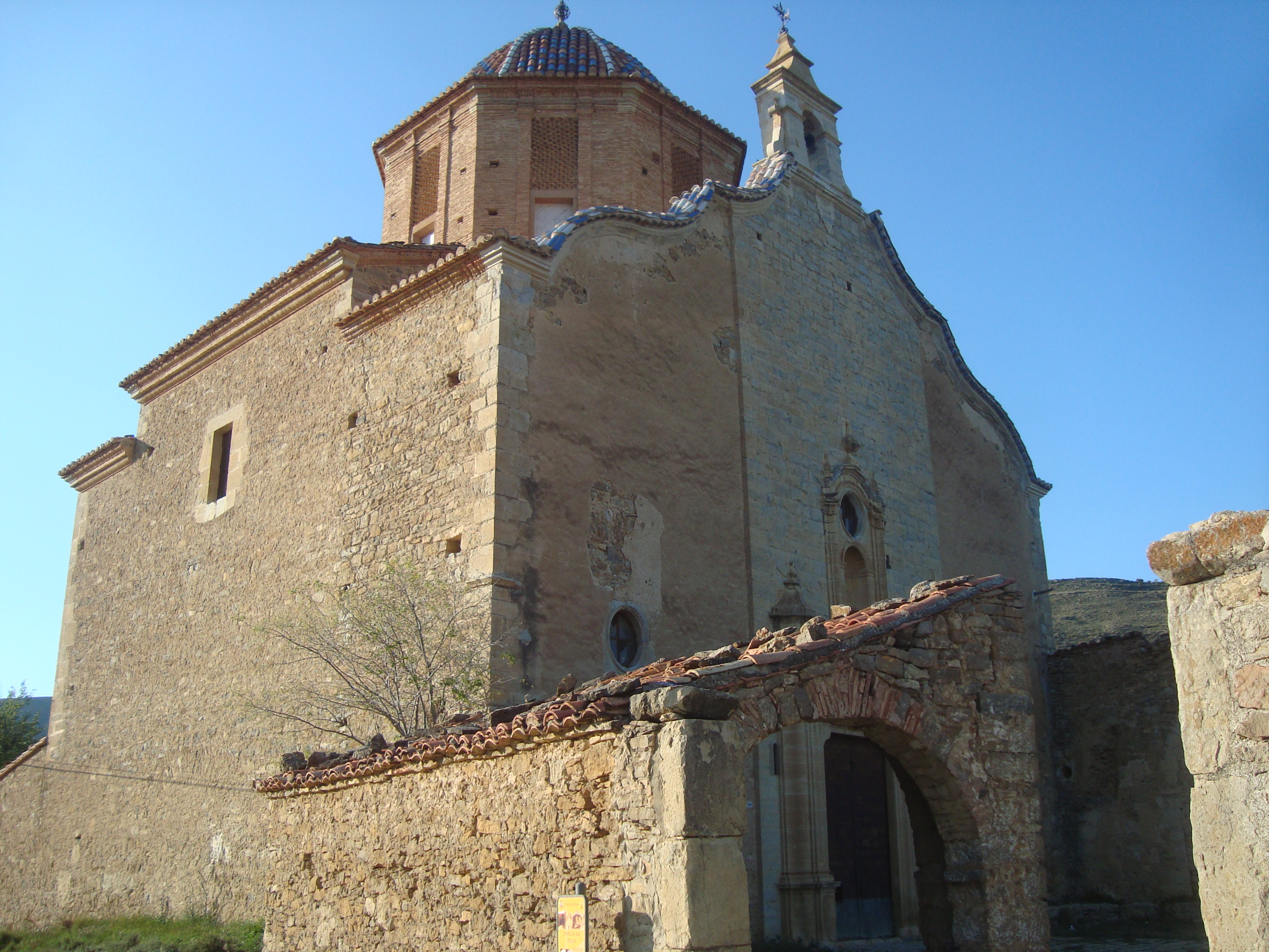 Ermitori de Sant Marc (Olocau del Rei) 01.083-003.